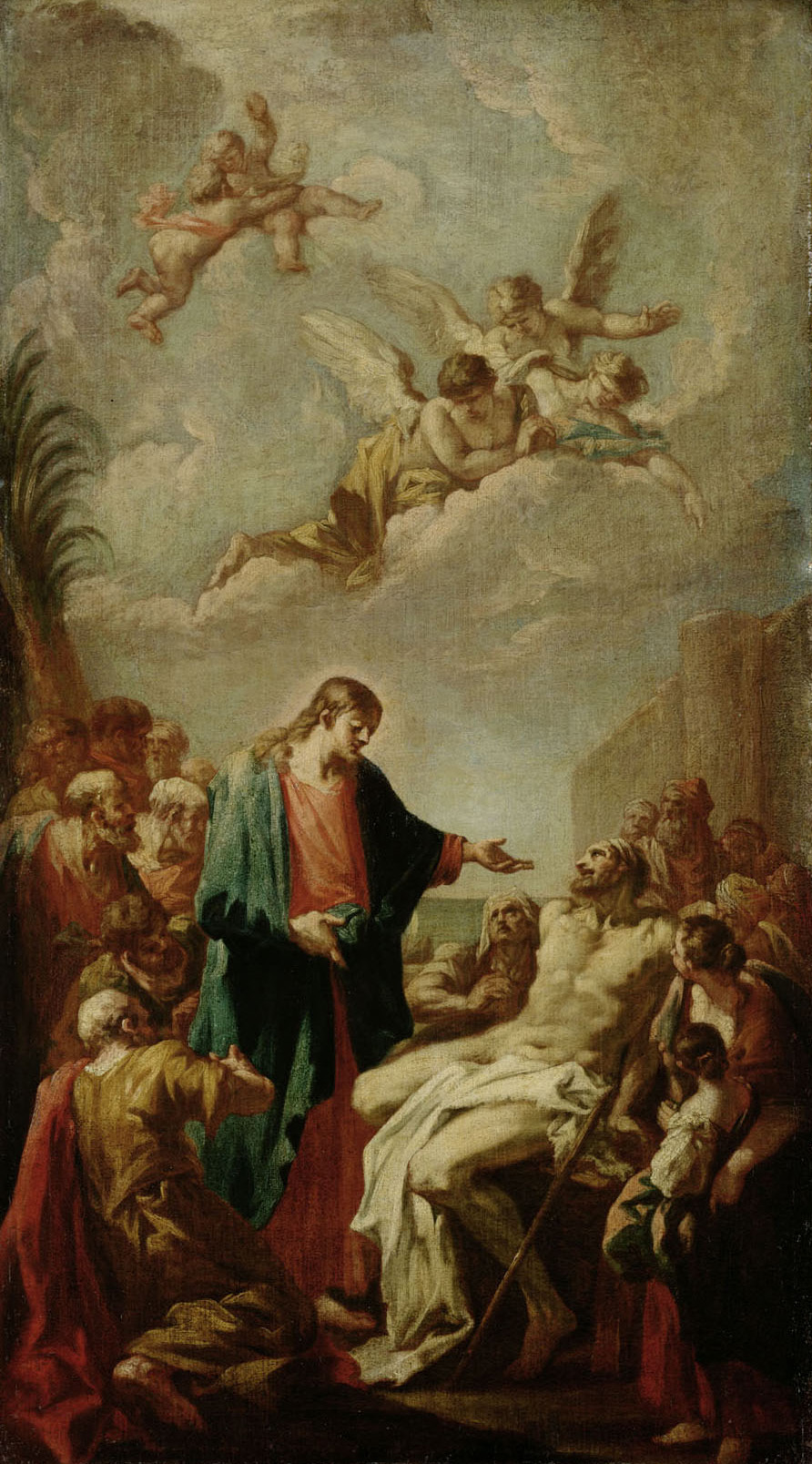 Gesù guarisce il paralitico, bozzetto per la pala della Karlskirche